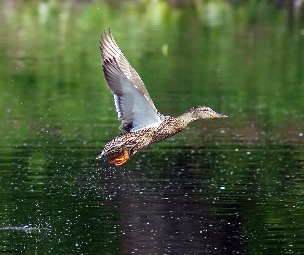 Looks better at large IMO.